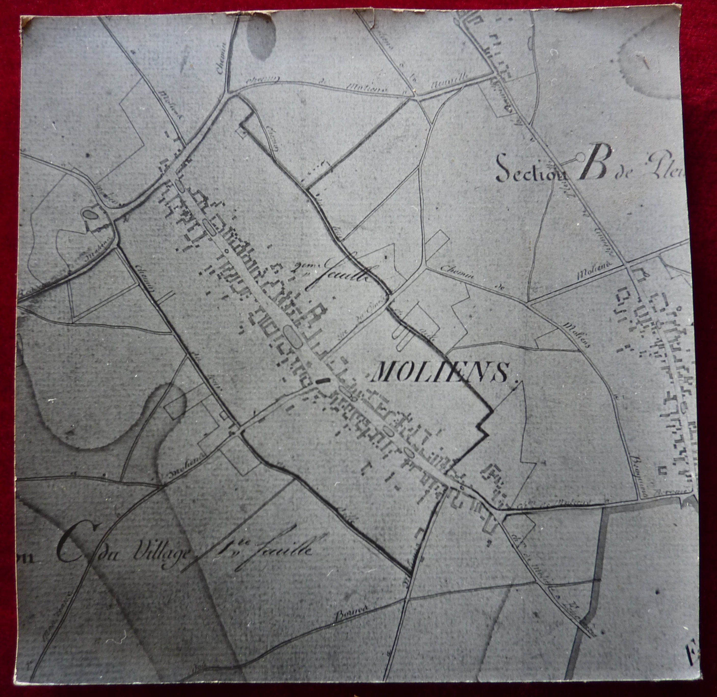 Ancien cadastre de Moliens, Oise.